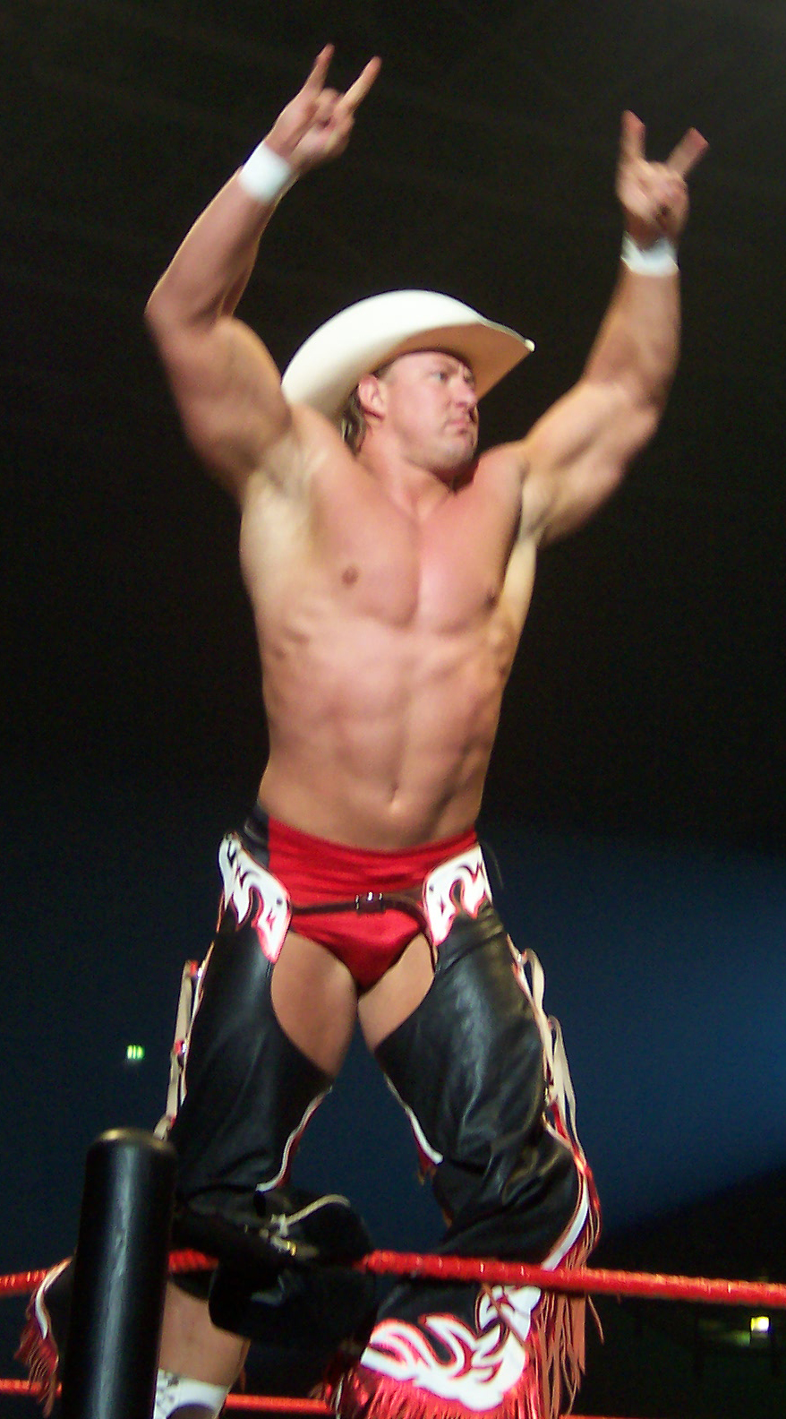 Lance Cade 2007 in Bremen